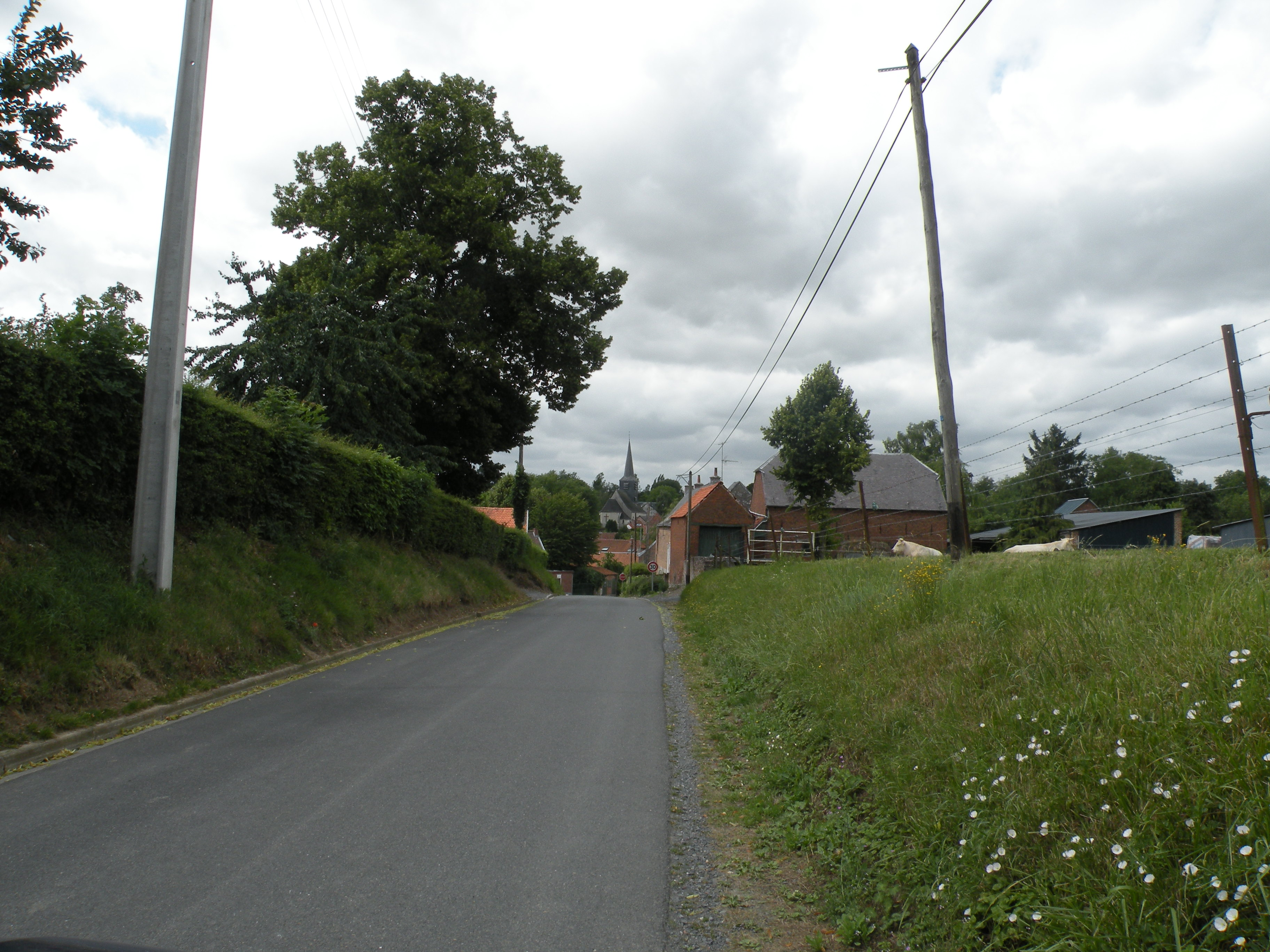 vue de eth, nord, france